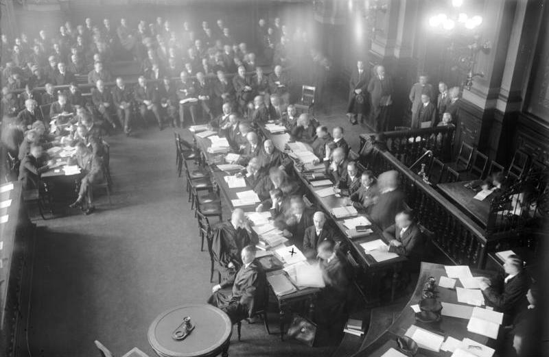 Die Urteilsverkündung im Barmatprozess im großen Schwurgerichtssaal in Moabit. Der Prozeß dauerte 14 Monate und kostete ca. 400.000,-. Blick auf die Anklagebank im großen Schwurgerichtssaal in Moabit mit Julius Barmat (X), sowie dem Mitangeklagten, sein Bruder Henry Barmat und das große Aufgebot der Verteidiger.